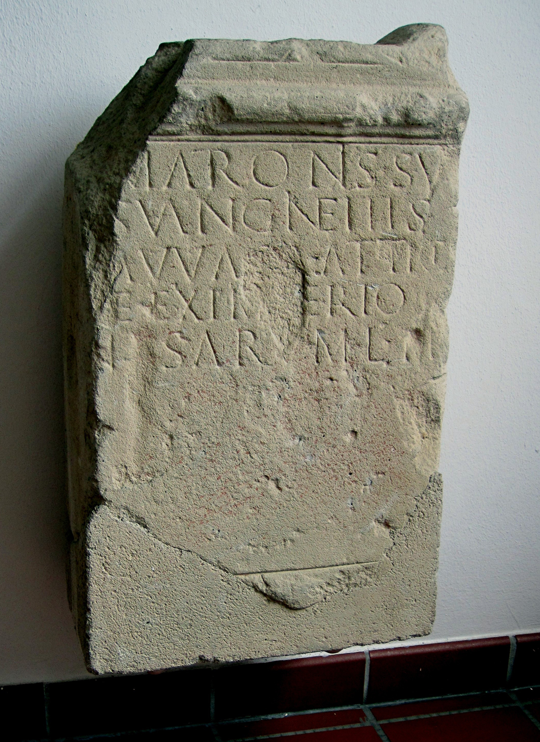 Friesheim-Matronenstein- der-Matronae-Vanginehae-3-Jh-Replik-Original –im-Rheinischen-Landesmuseum-Bonn